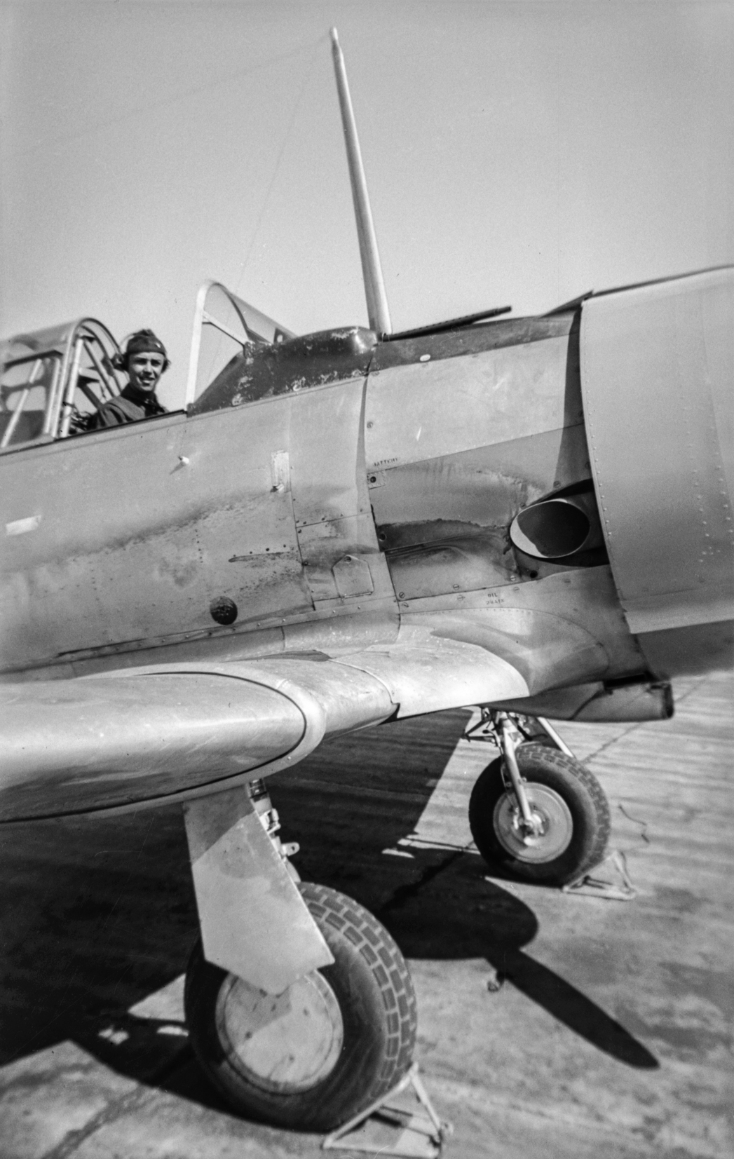 Mario Gottfried durante su entrenamiento de vuelo en 1942 Fuente: Potencia Industrial, S.A. Fecha: 1942 Archivo derivado=2014 Autor: Gustavo Cesar Gottfried Gutiérrez